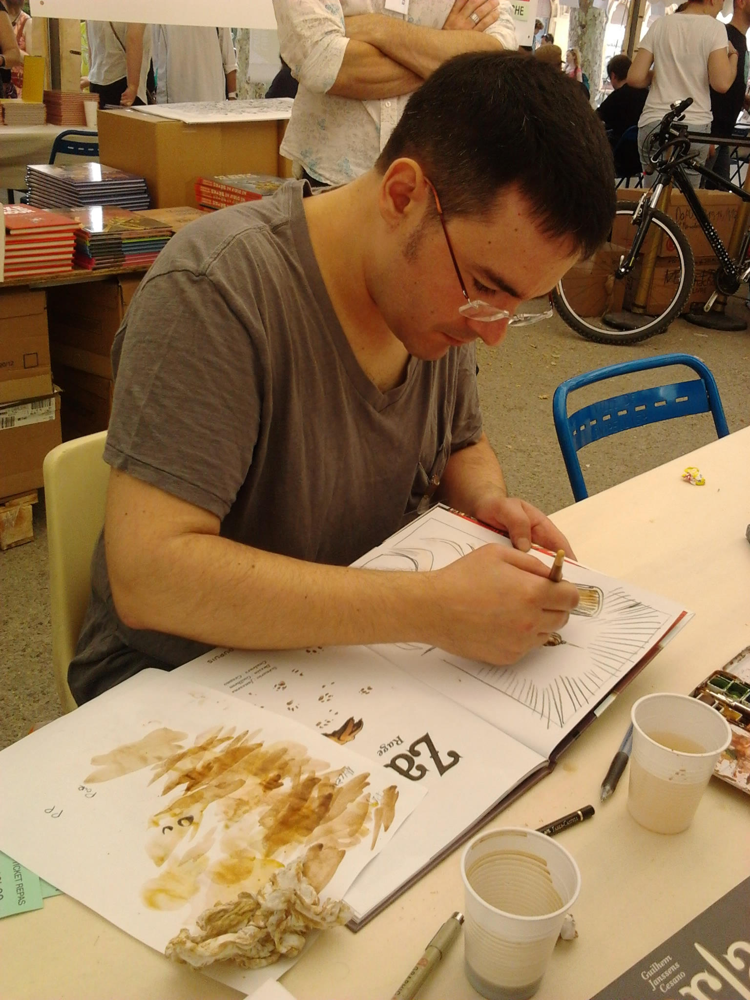 Guilhem Bec, dessinateur français de bandes dessinées (Zarla), à la Comédie du livre de Montpellier, le 2 juin 2012